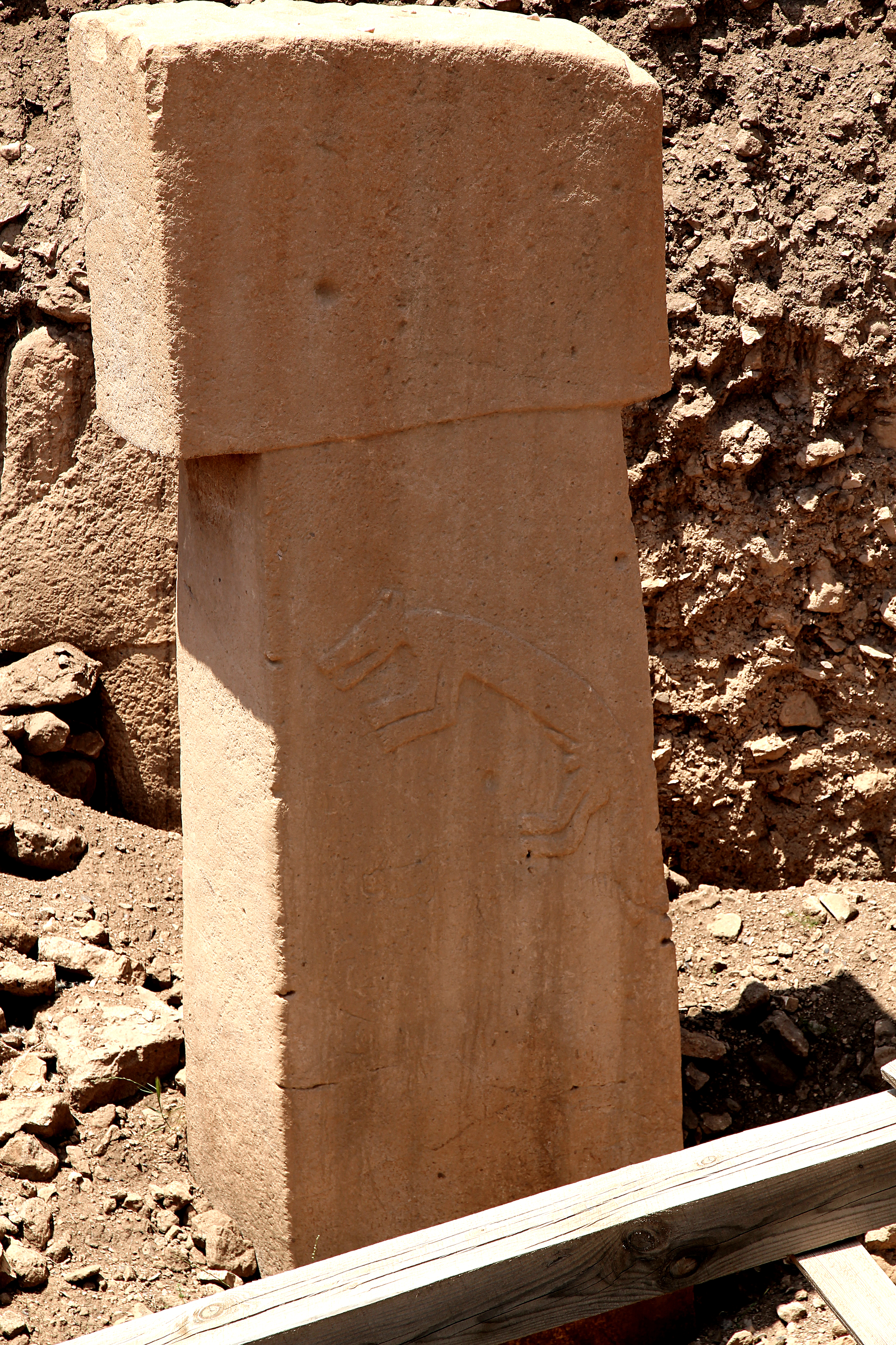 Göbekli Tepe, Siedlungshügel bei Şanlıurfa, Südosttürkei, Anlage B Pfeiler 10